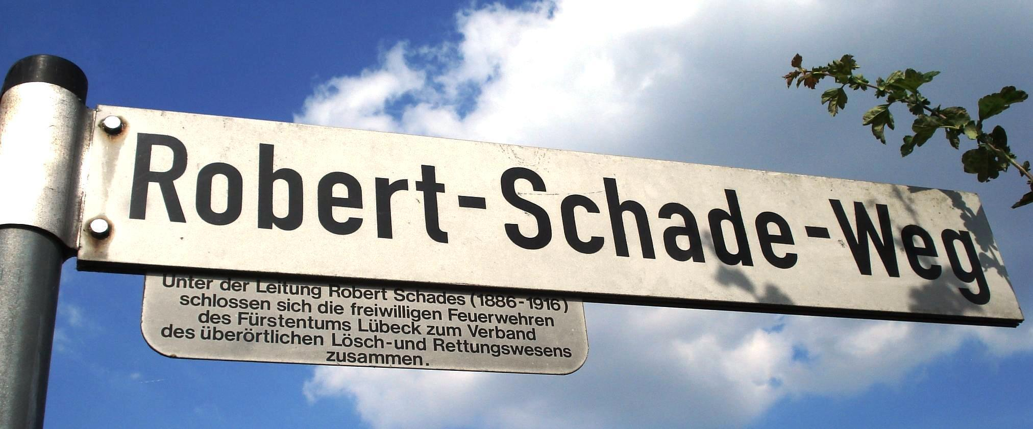 Schild Robert-Schade-Weg in Bad Schwartau.